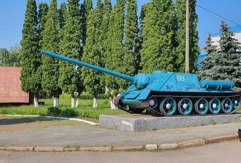 Танк